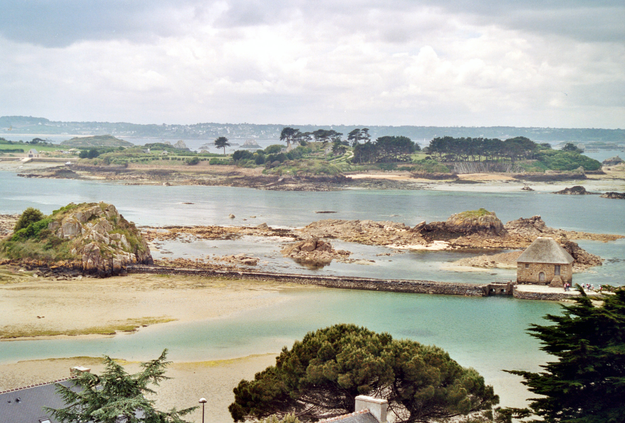 Bretagne Ile de Bréhat Auteur : GIRAUD Patrick